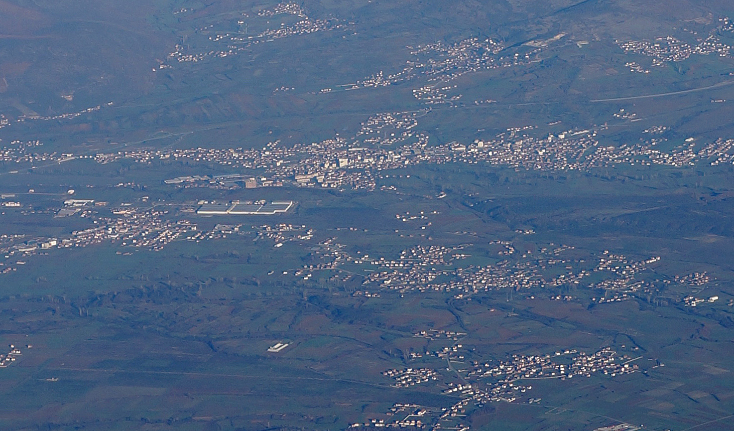 Suha Reka, Kosovo